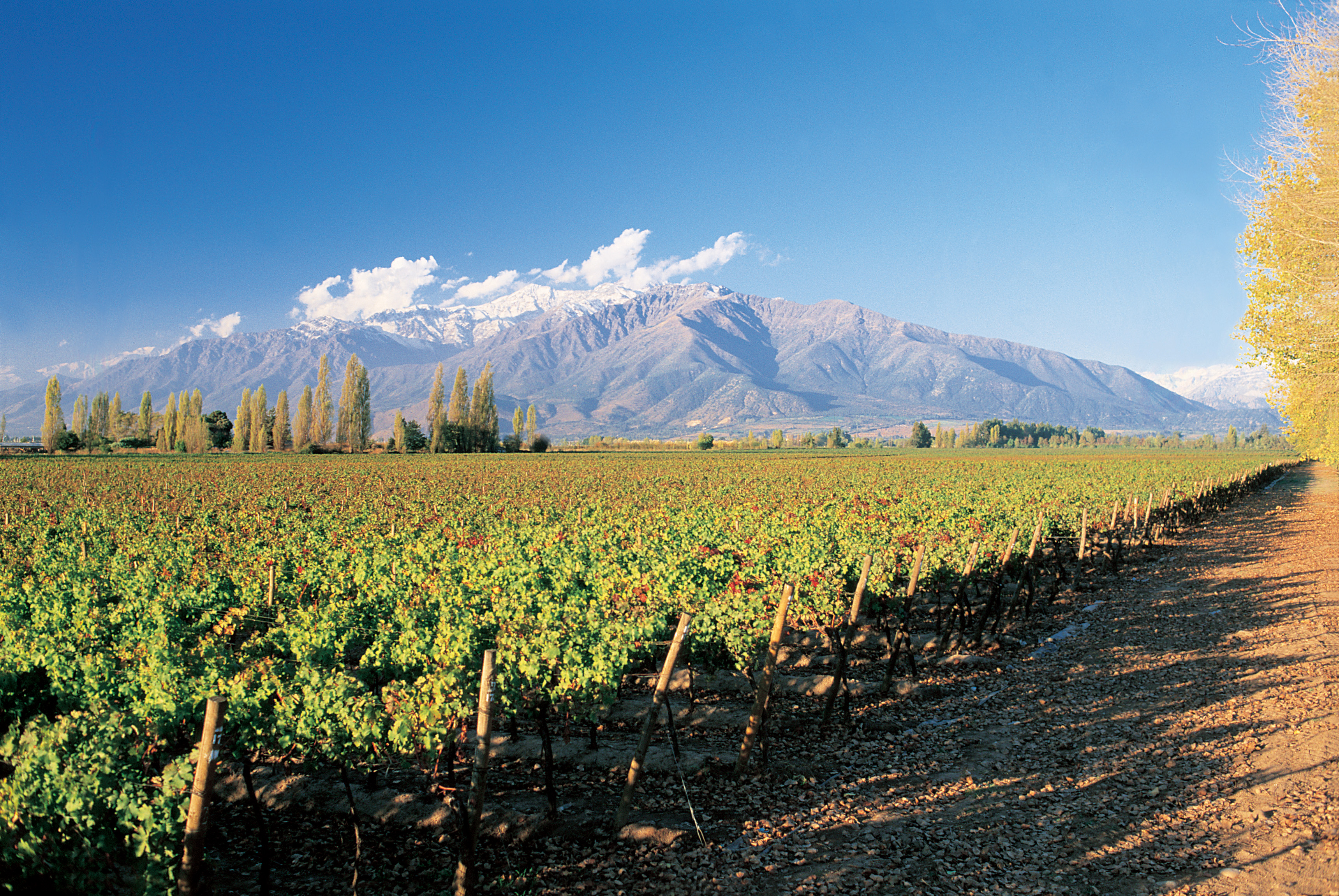 imagen viñedo Puente Alto, Chile